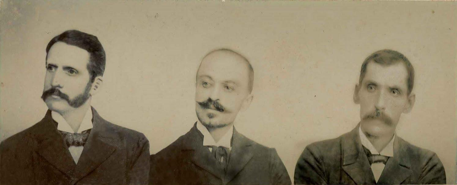 Fotografía de tres destacados escritores ecuatorianos, de izquierda a derecha: Remigio Crespo Toral, Honorato Vázquez Ochoa y Miguel Moreno en 1903.